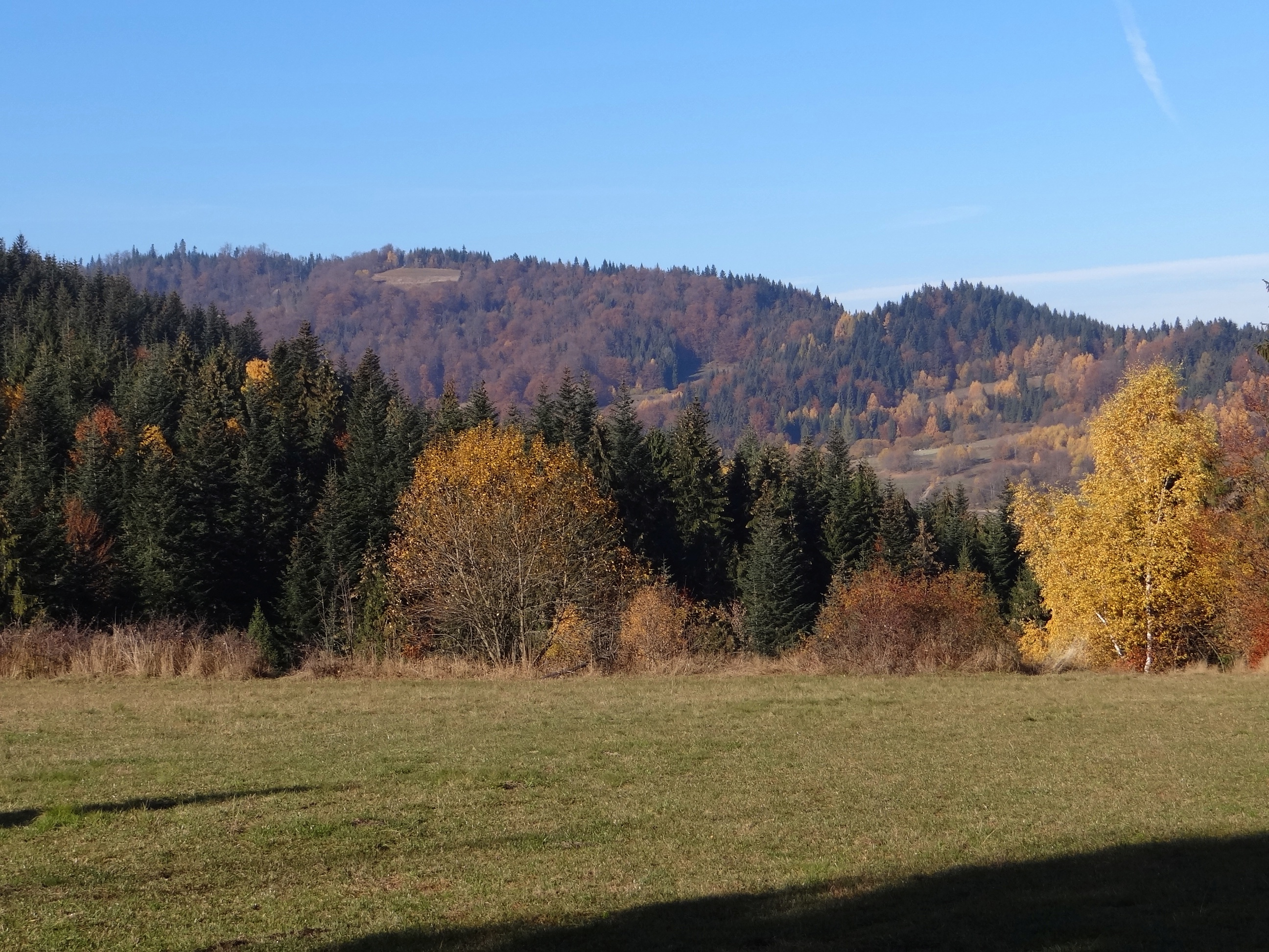 Przełęcz Wierch Młynne i widok na północno-wschodni grzbiet Gorca